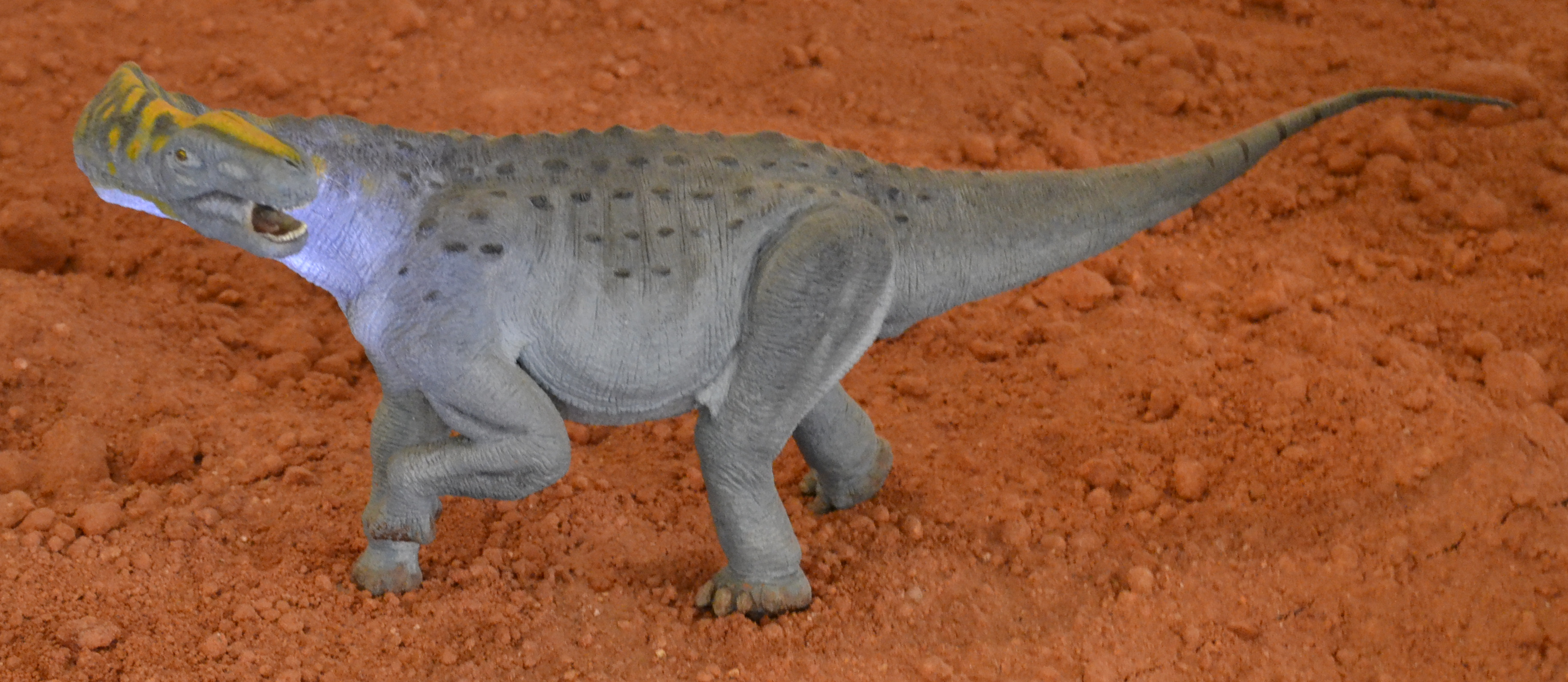 Miniatura do dinossauro Maxakalisaurus Topai exibida no Museu Nacional da Universidade Federal do Rio de Janeiro, Quinta da Boa Vista, Rio de Janeiro